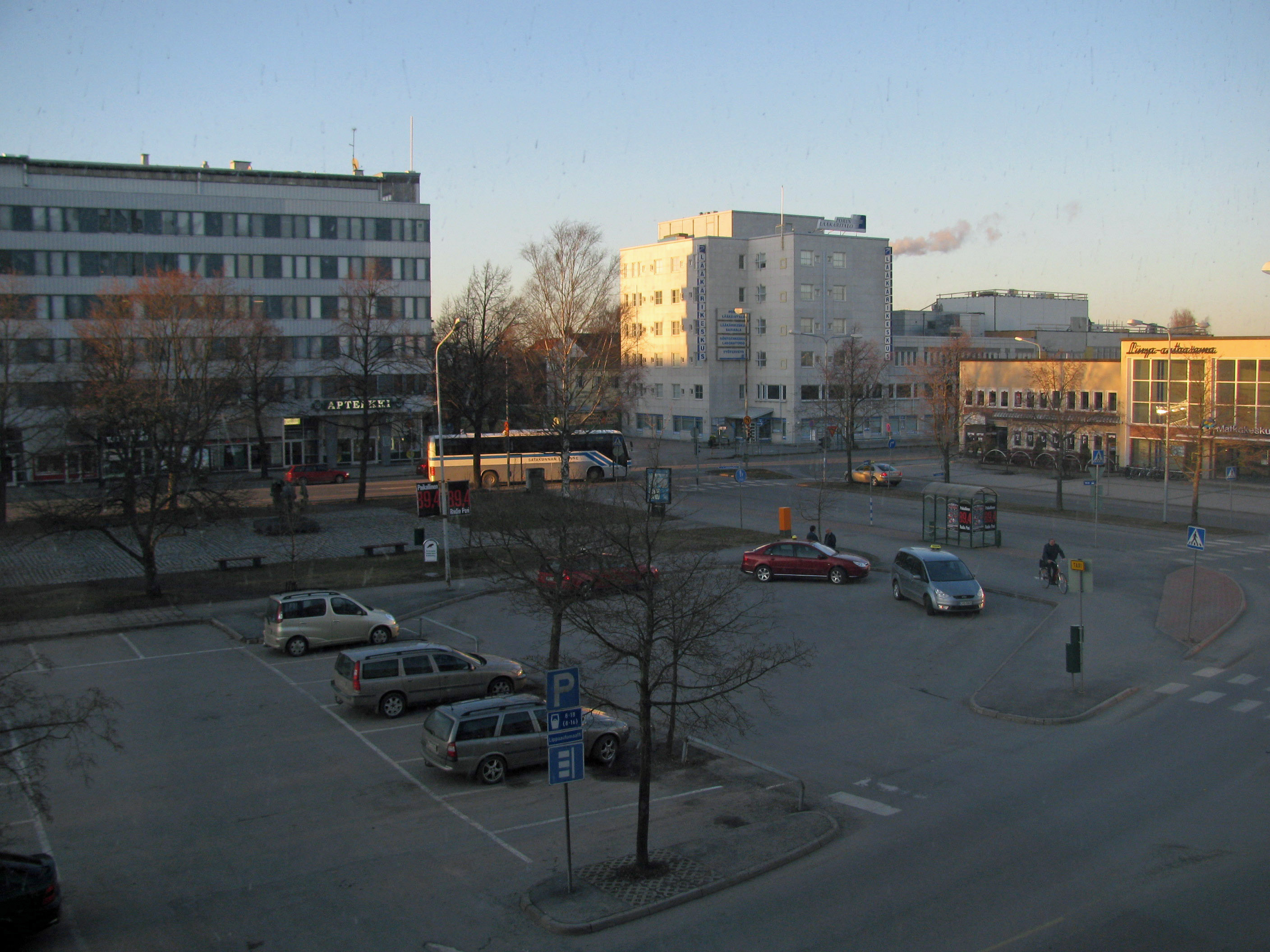 Porin keskusaukio, Amado-hotellin ja linjaautoaseman kupeessa